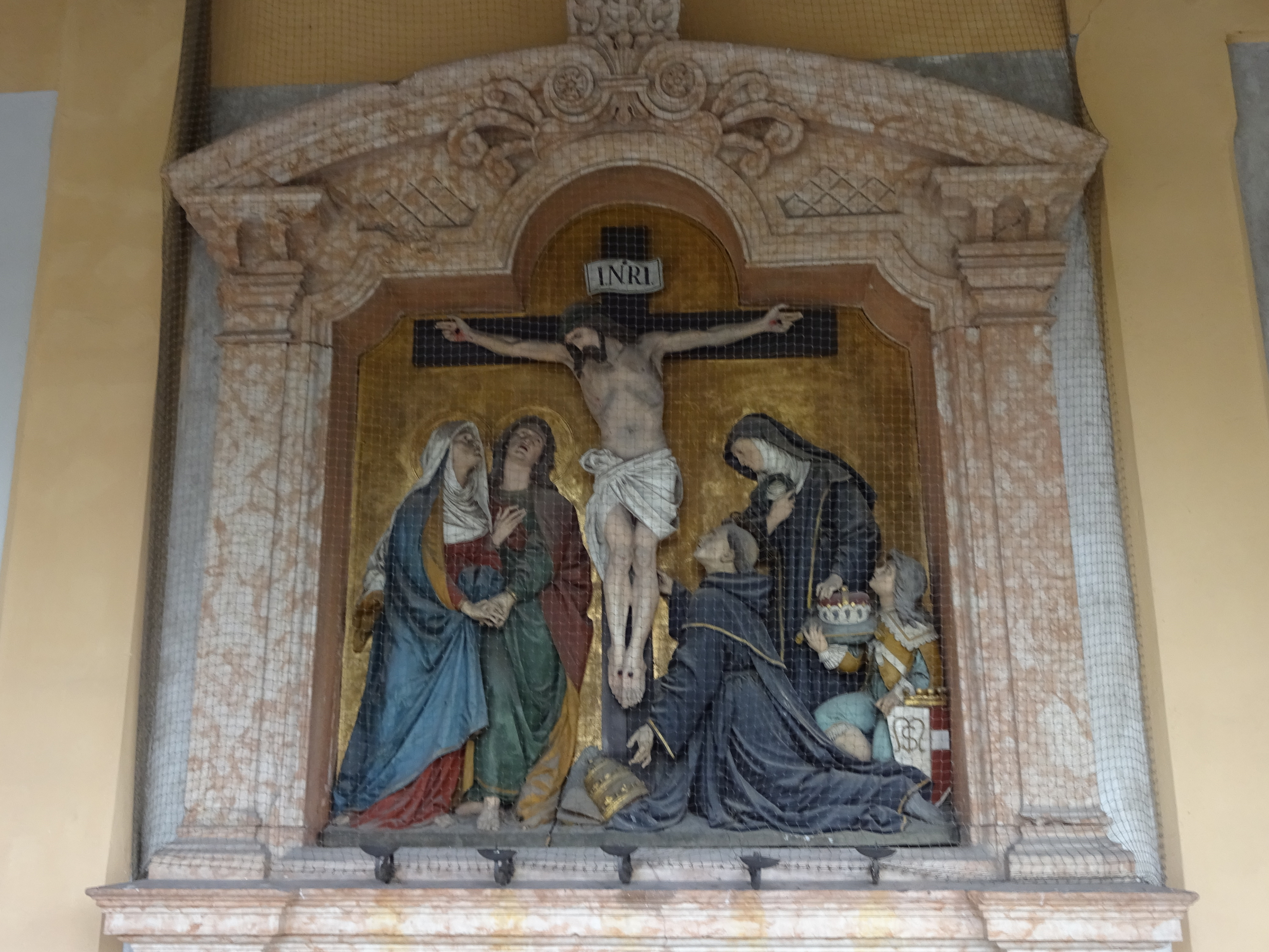 Westfriedhof Innsbruck, nördlicher Teil, Arkade 42, Grabstätte der Serviten, Kreuzigungsgruppe mit hl. Philippus Benizzi und Anna Caterina (Juliana) Gonzaga von Engelbert Kolp (1876)